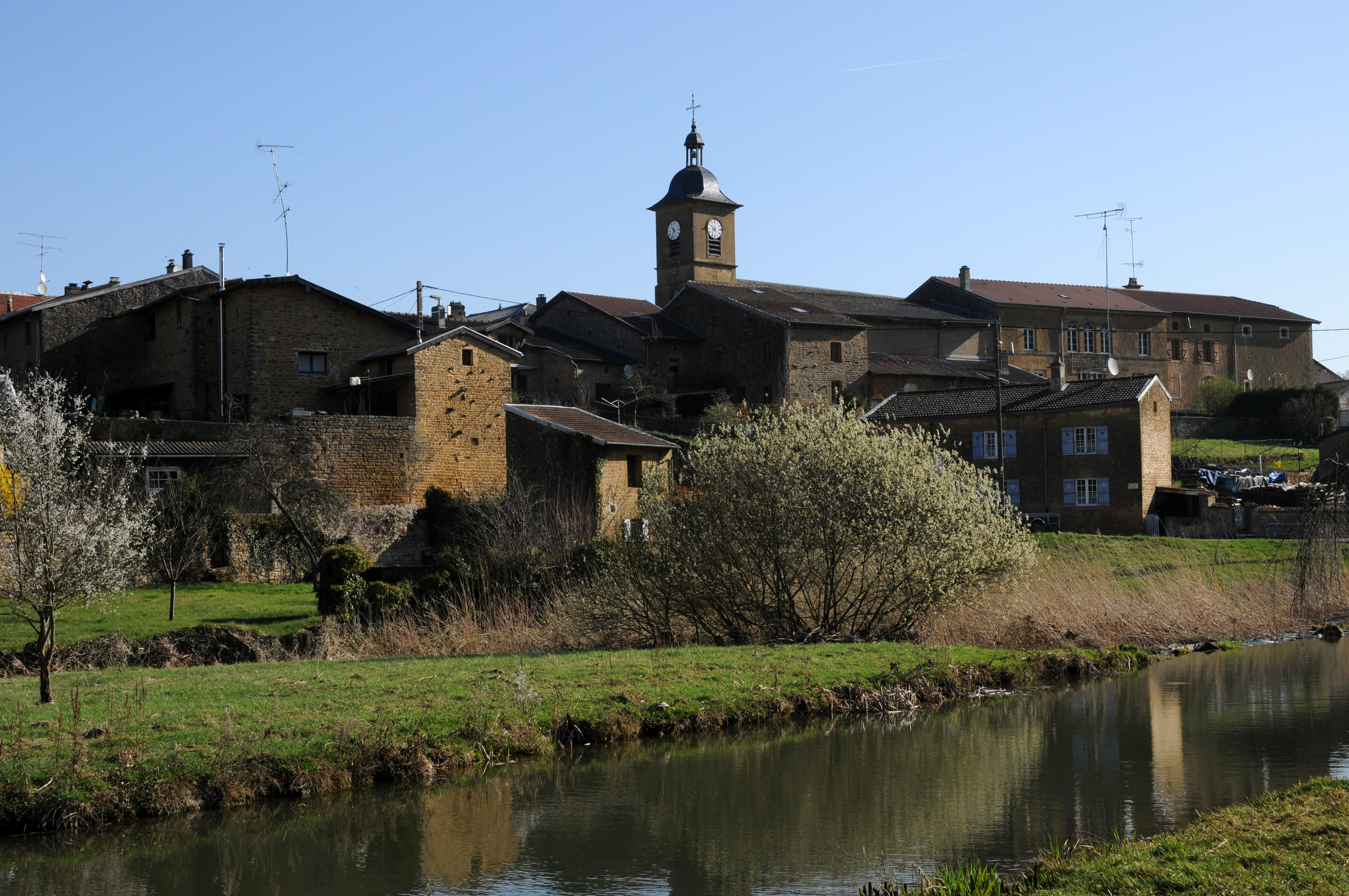 L'Othain à Bazeilles-sur-Othain. This photograph was taken with a Nikon D300 This image was created with Picasa.